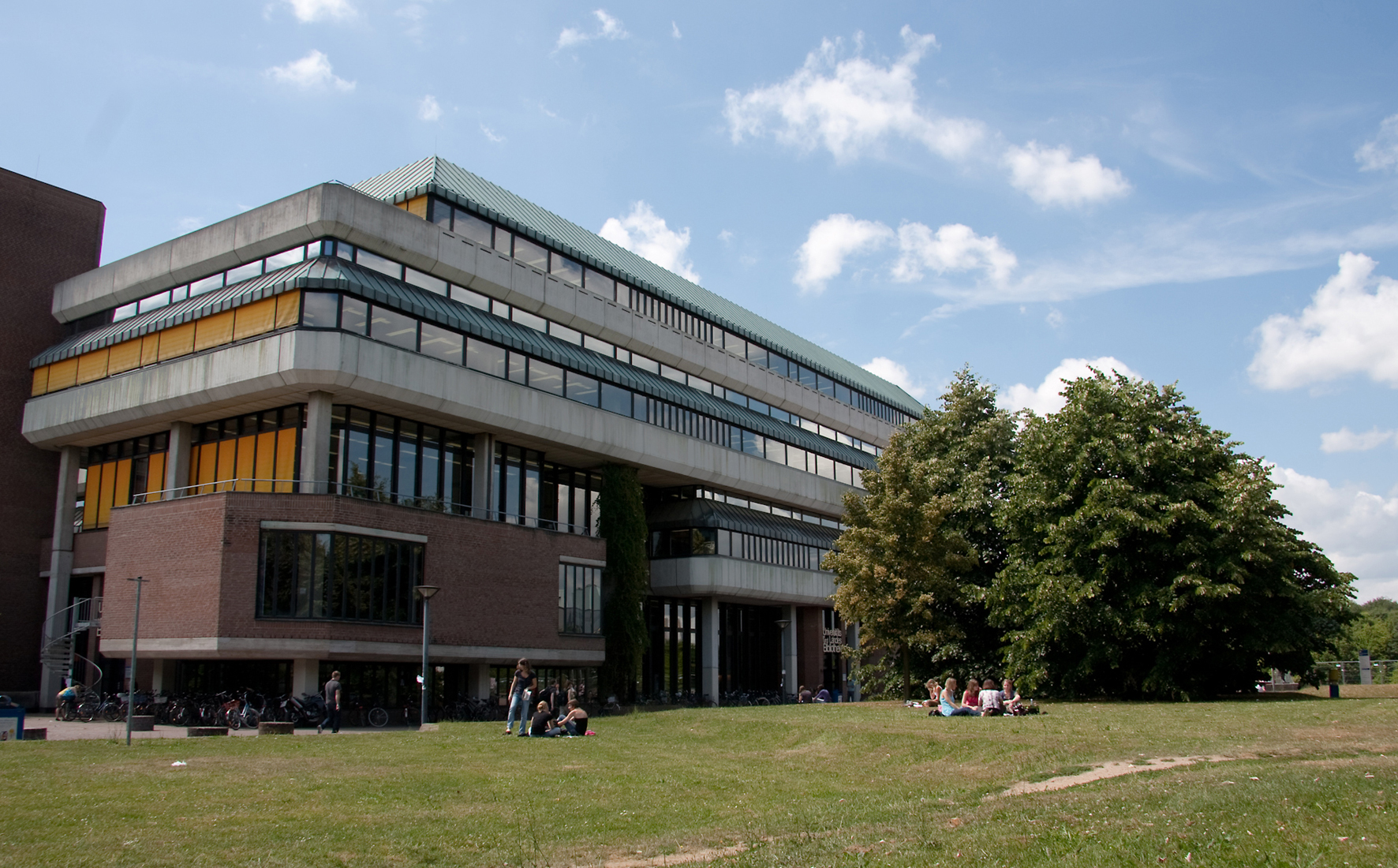 Heinrich-Heine-Universität Düsseldorf, Universitäts- und Landesbibliothek